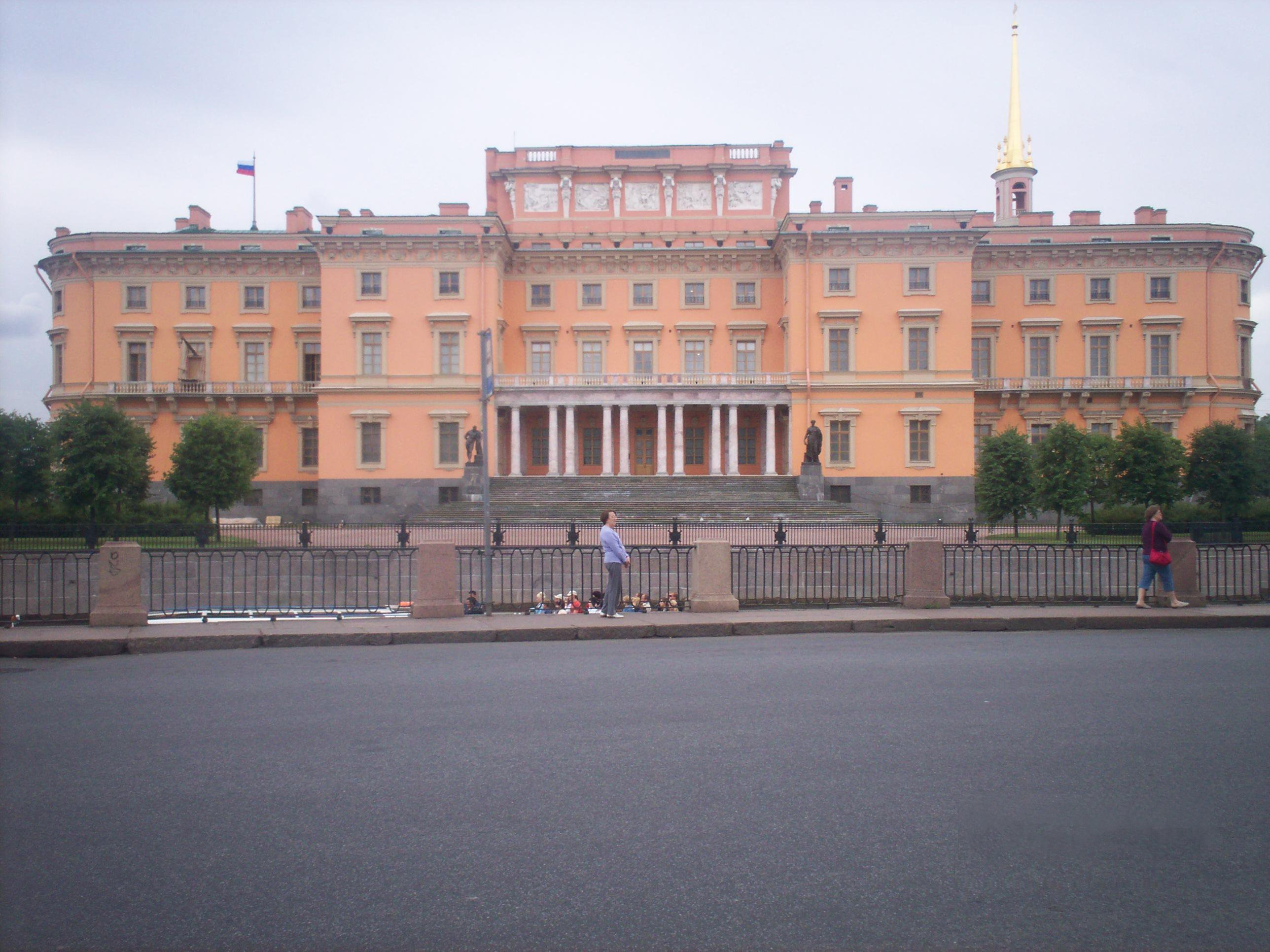 Mihailovskij zamok v Sankt-Peterburge